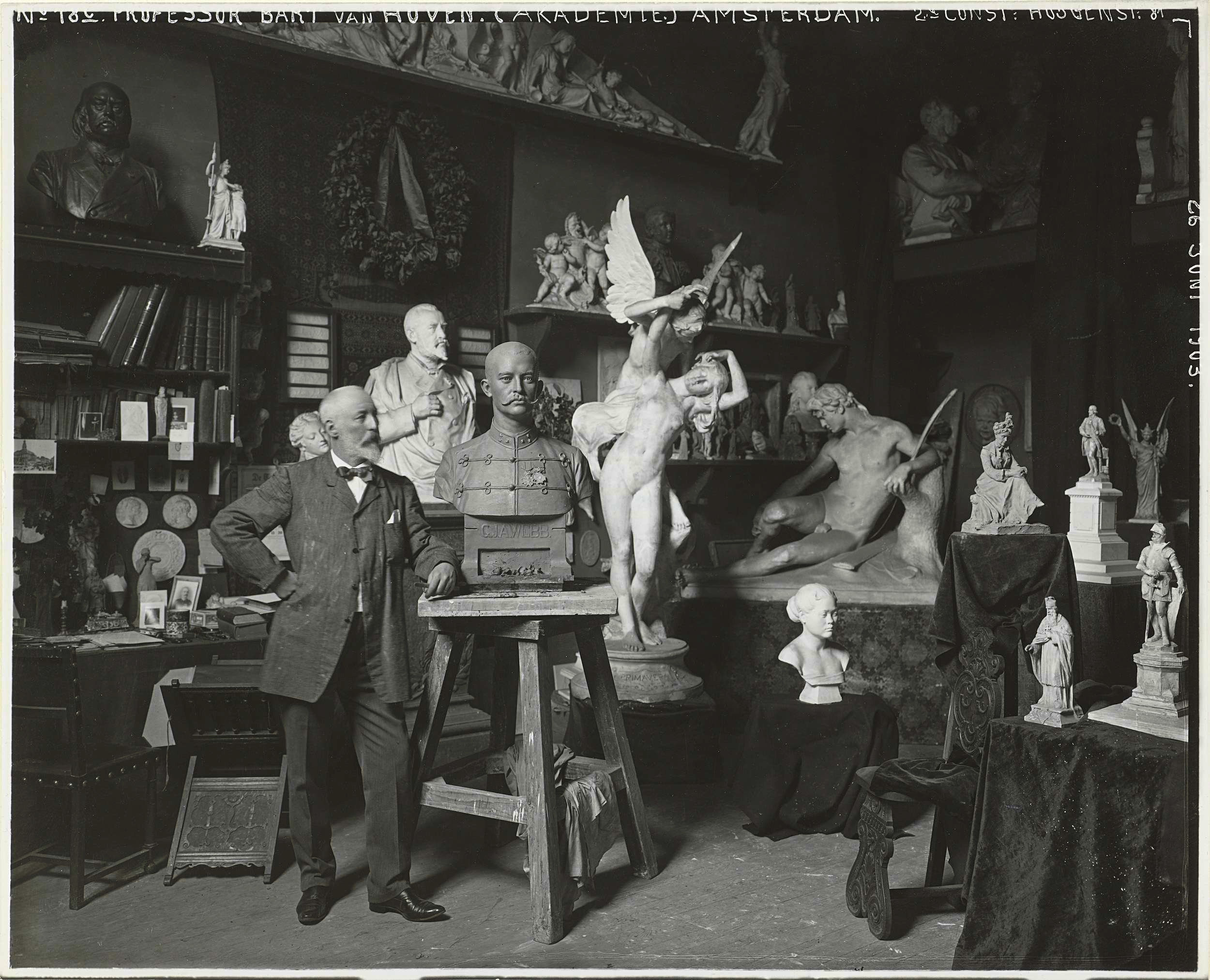 De beeldhouwer Bart van Hove in zijn atelier, gefotografeerd door Sigmond Löw in 1903 [Rijksmuseum object RP-F-00-2590]